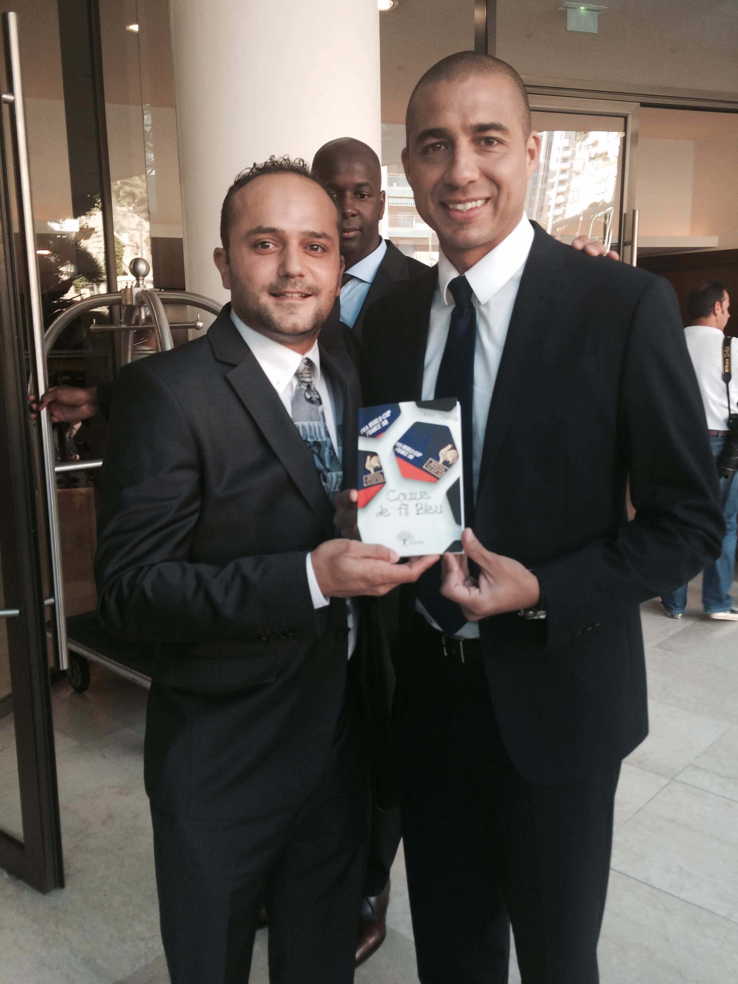 Rencontre entre Olivier Démolis et David Trezeguet